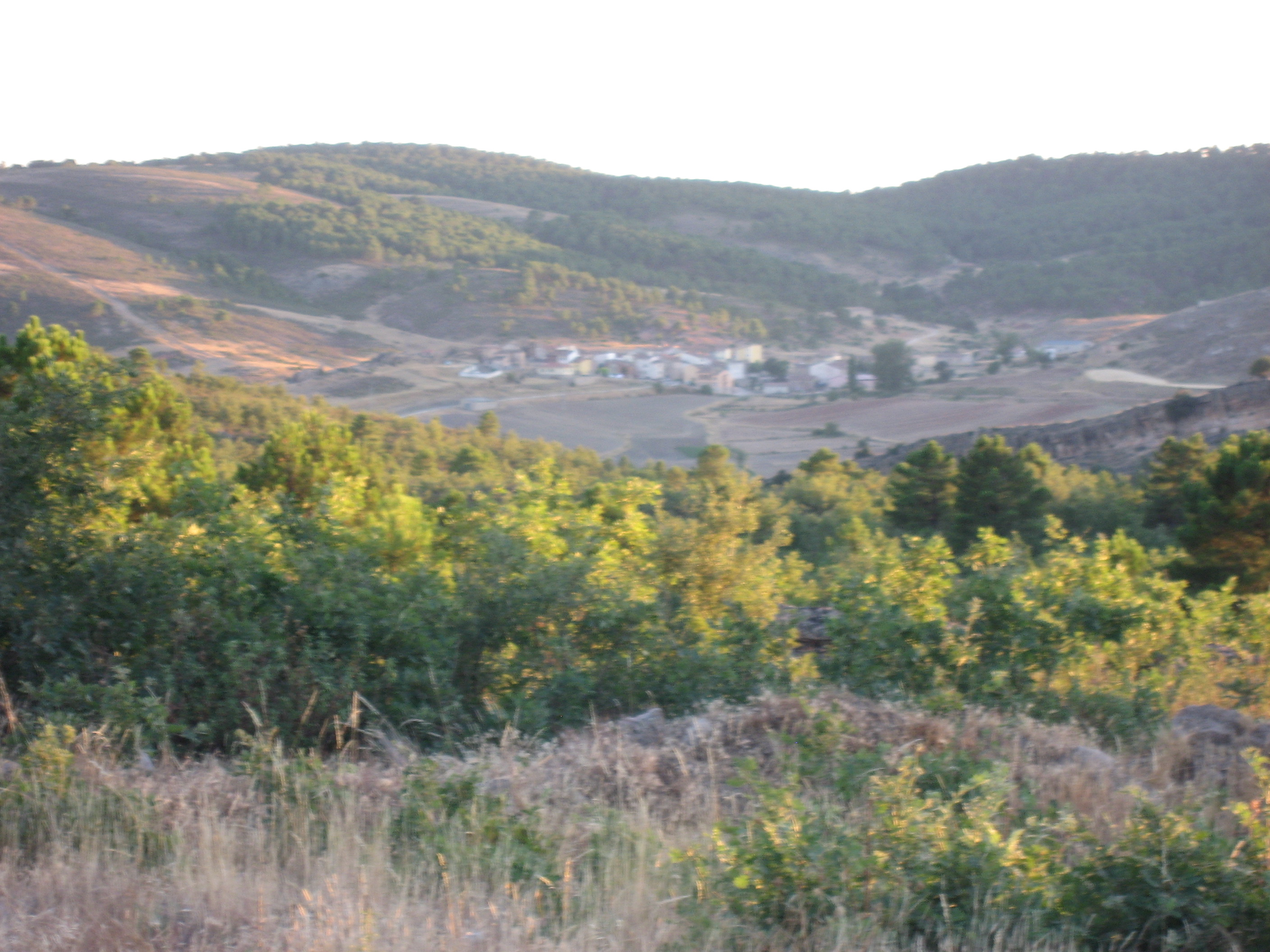 El pueblo de Santa María del Espino, antigua Rata del Ducado.